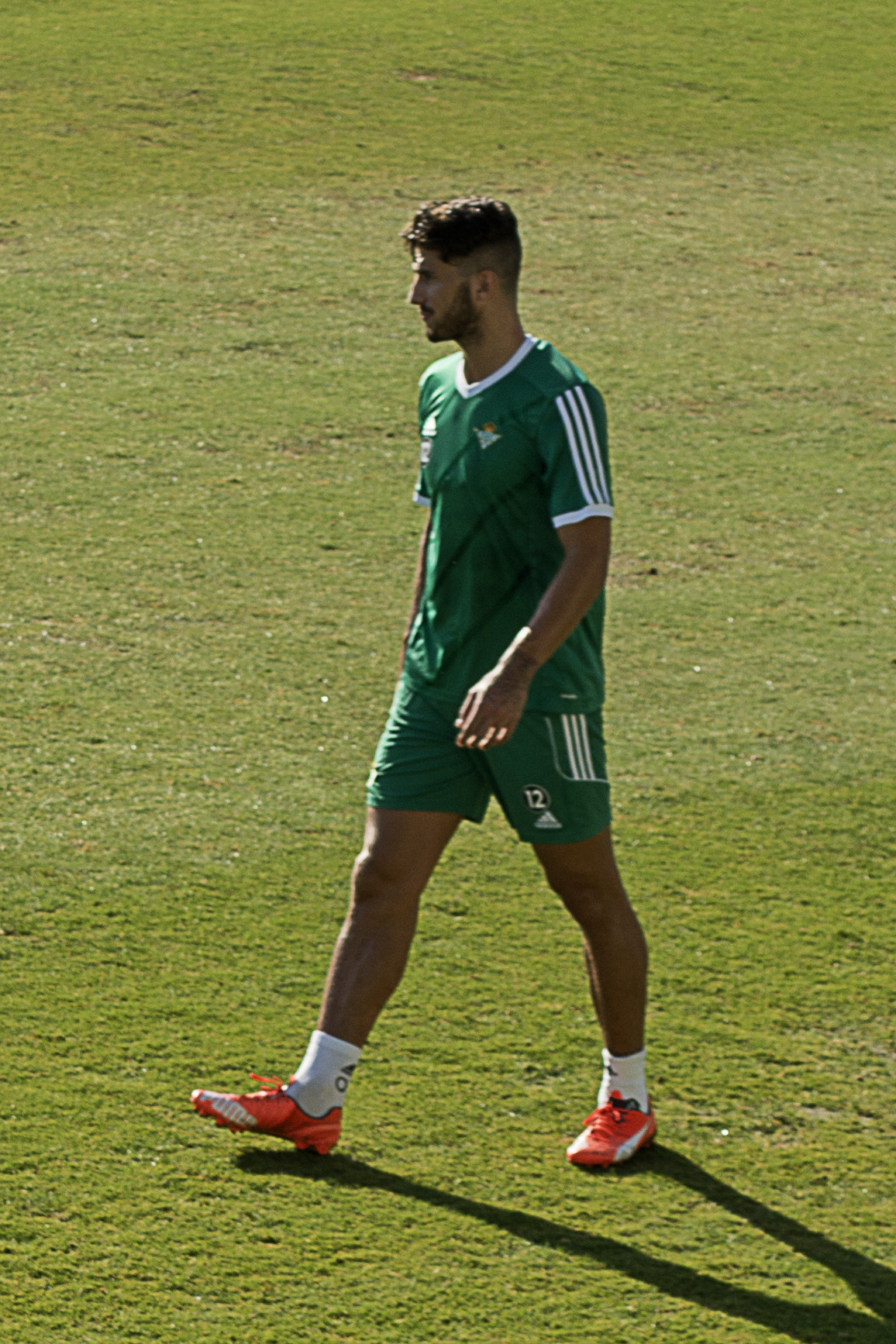 Cristiano Piccini, futbolista del Real Betis en 2015. Entrenamiento en la ciudad deportiva Luis del Sol